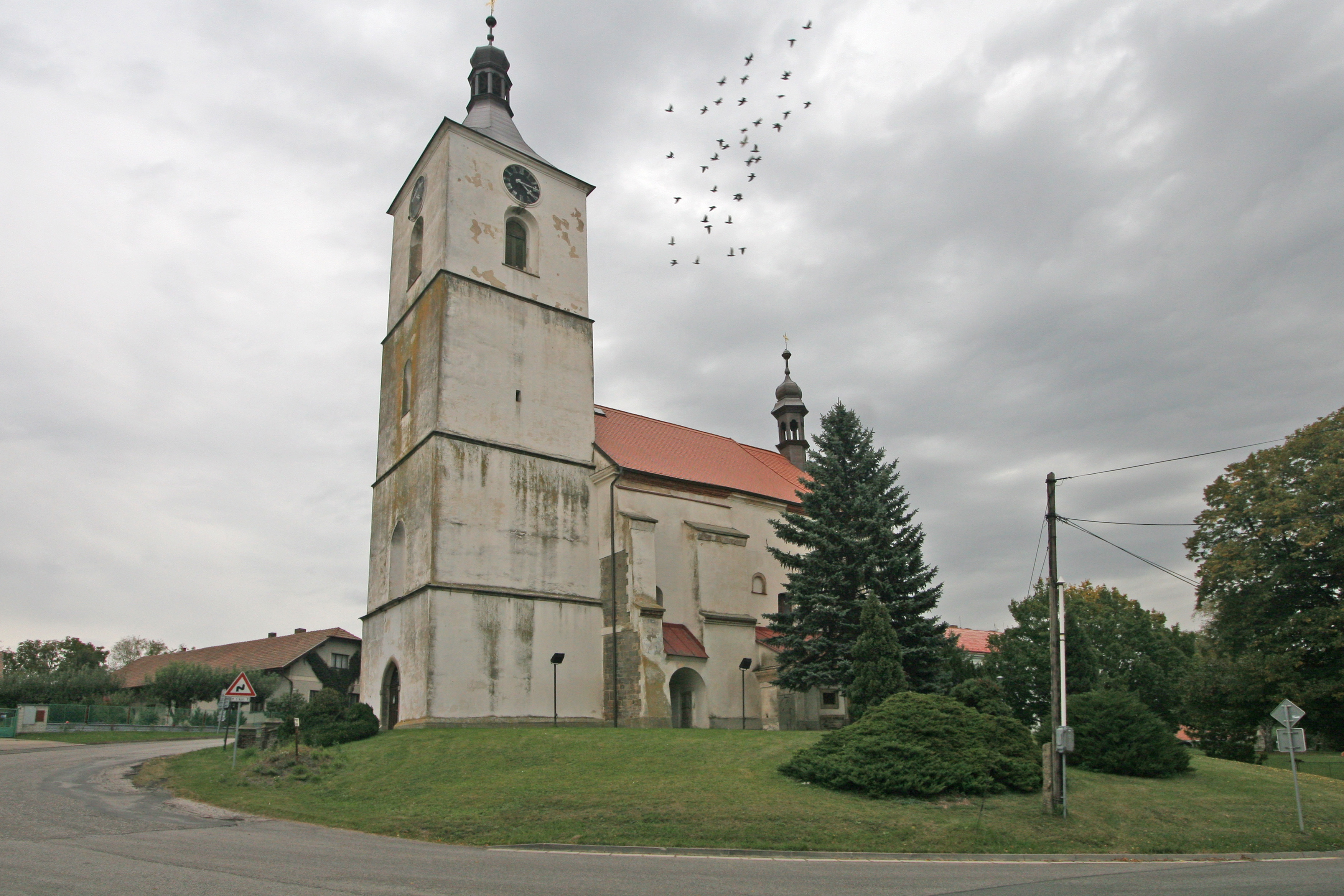 Kostel sv. Prokopa (Starý Bydžov), Starý Bydžov